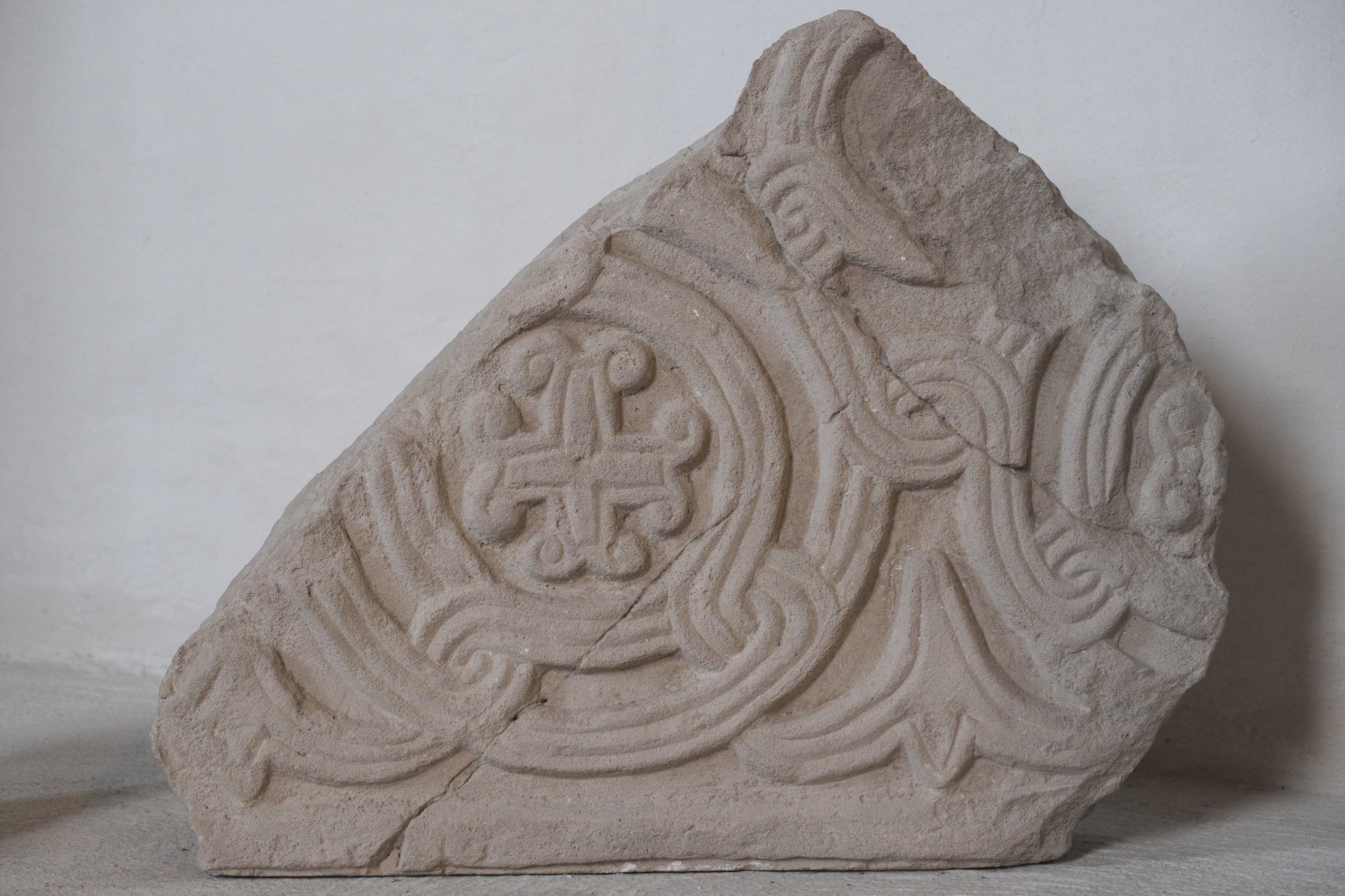 Katholische Pfarr-, ehemalige Kollegiatstiftskirche St. Arsatius in Ilmmünster im Landkreis Pfaffenhofen an der Ilm (Bayern/Deutschland), Fragment einer karolingischen Chorschranke (Ilmmünster Kreuz), um 780-800